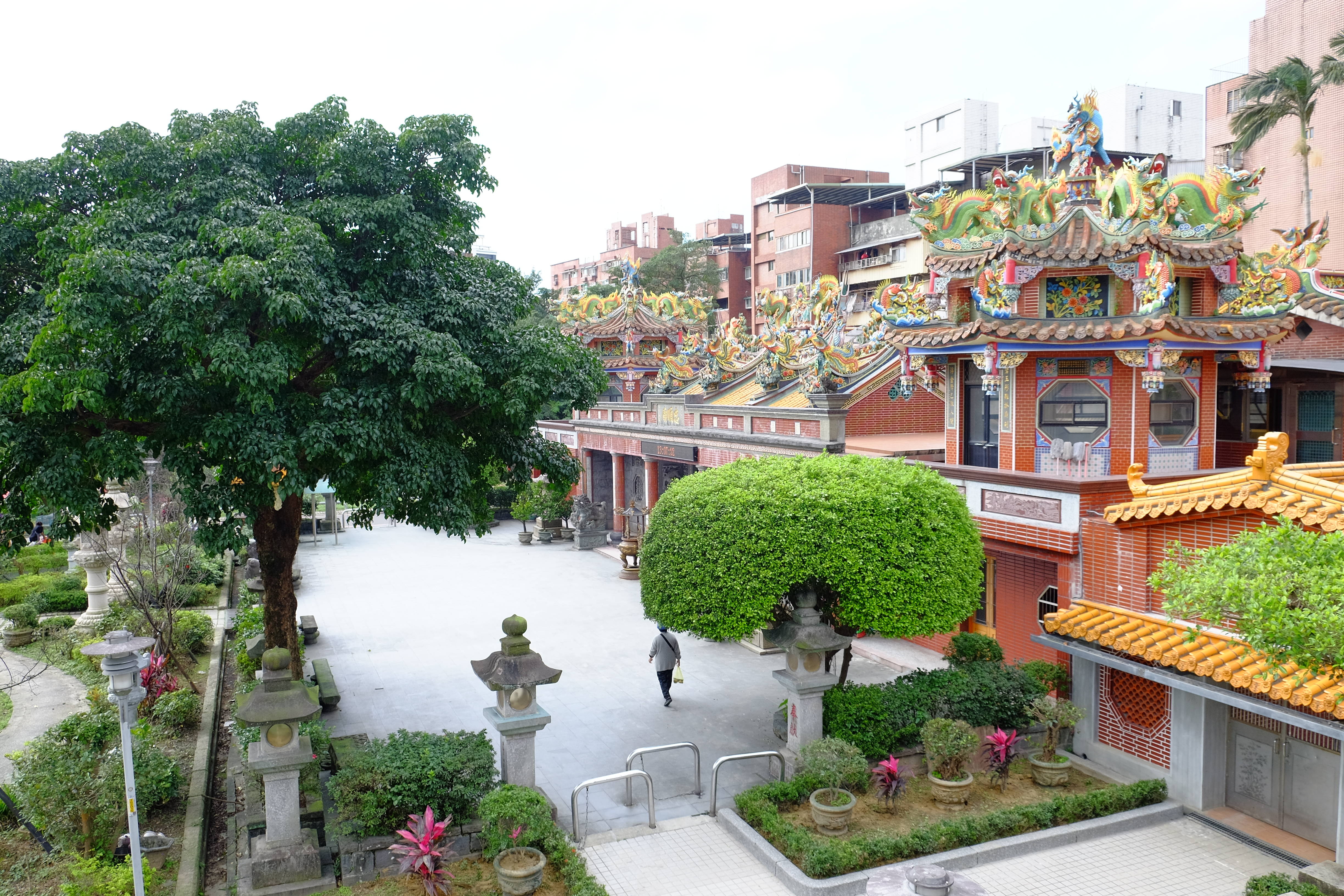 汐止忠順廟廟前廣場